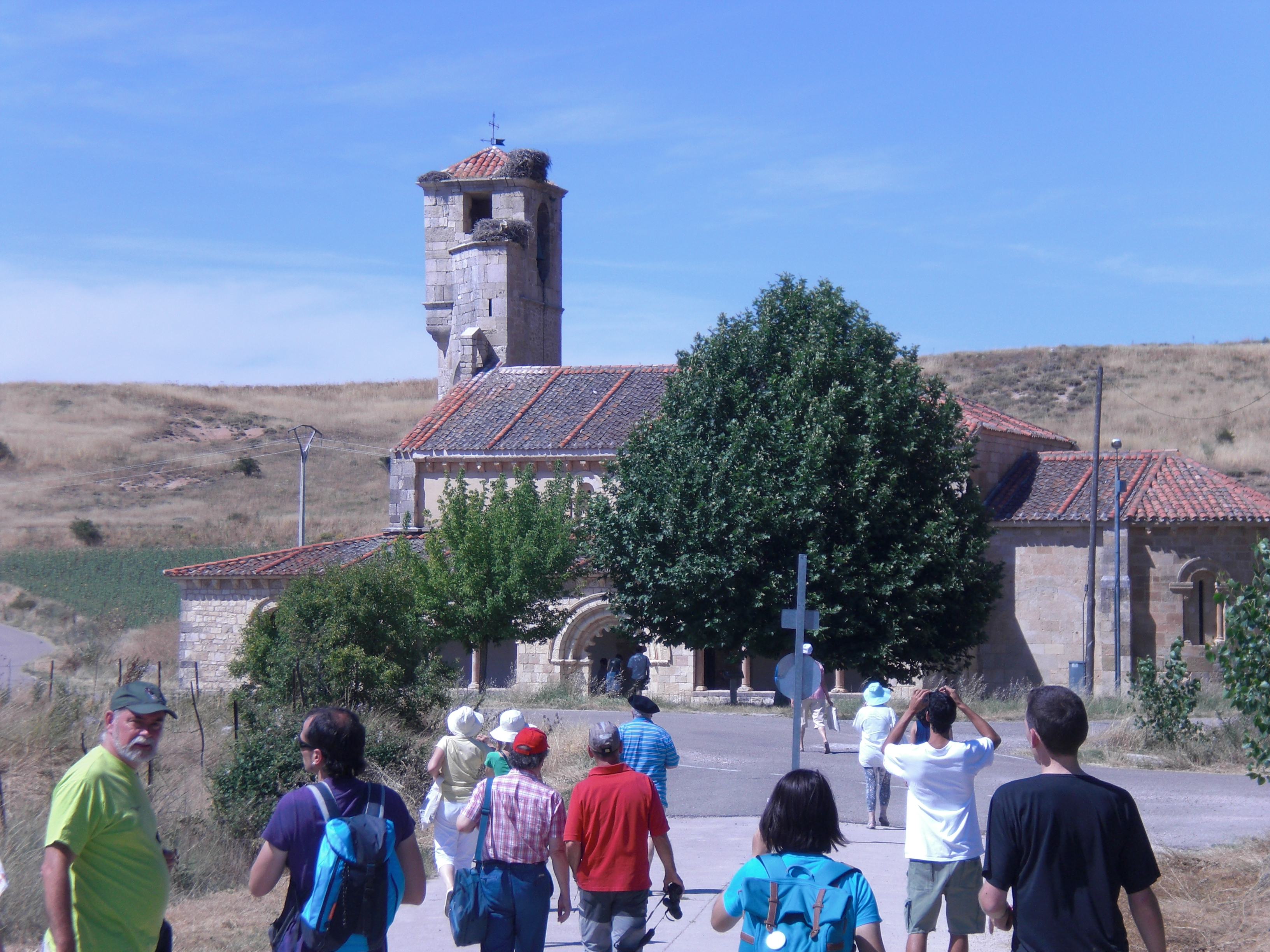 duraton